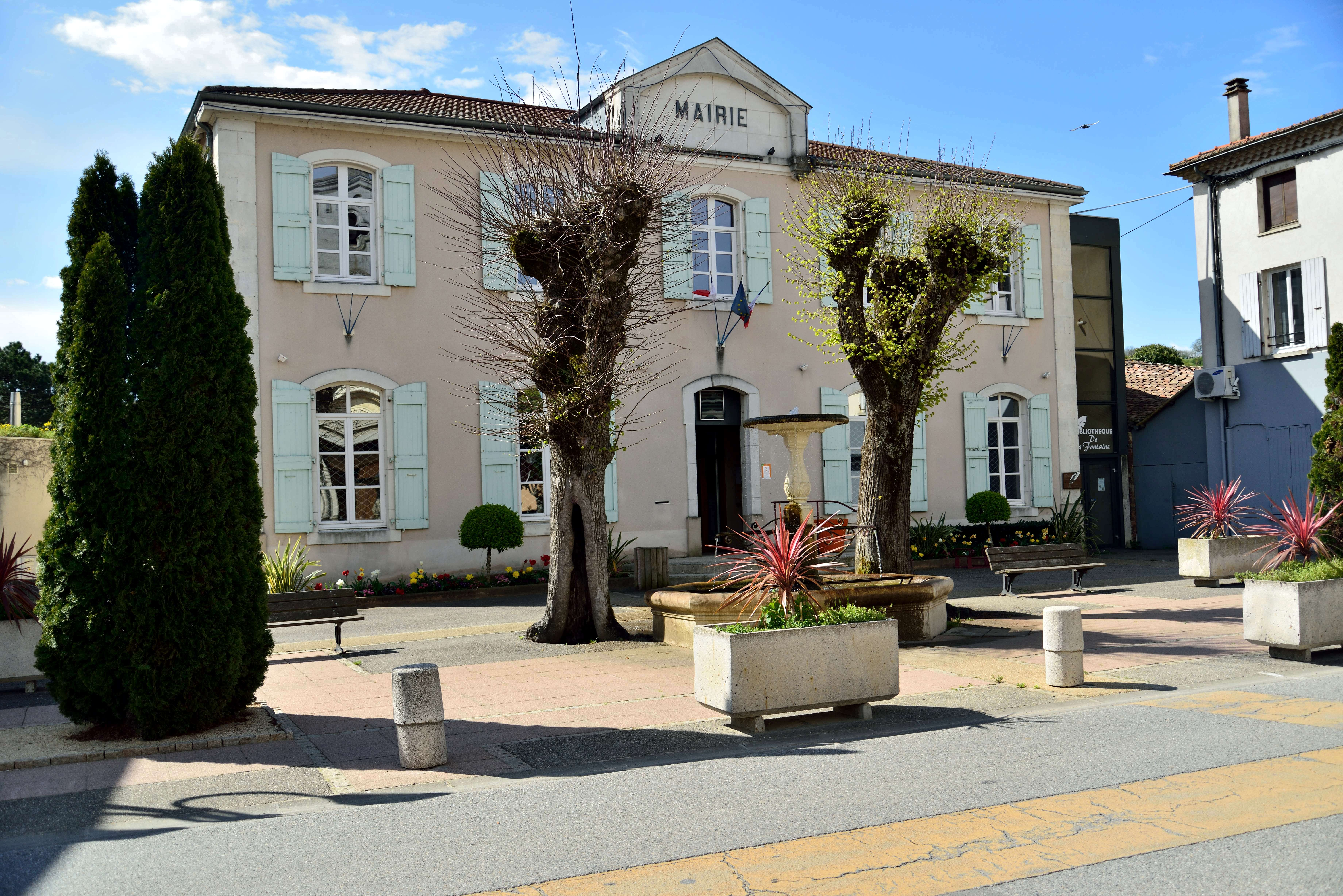 mairie de Saint Barthélémy de Vals